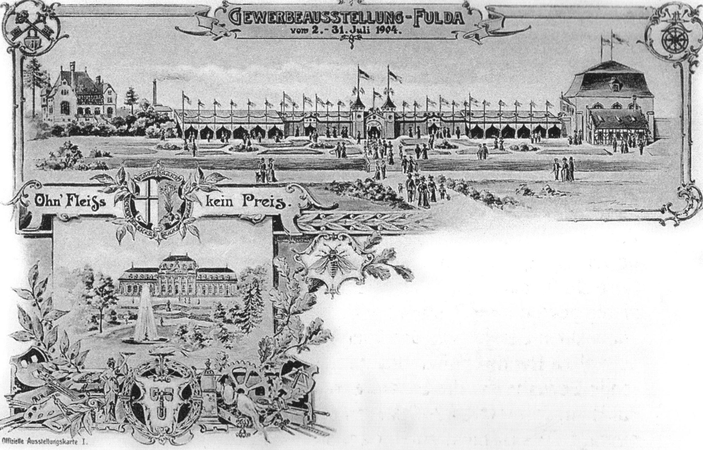 Offizielle Postkarte zur Gewerbeausstellung in Fulda vom 2. bis 31. Juli 1904